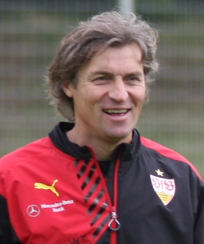 Walter Thomae beim Auftakttraining 2015/16. Augenommen von